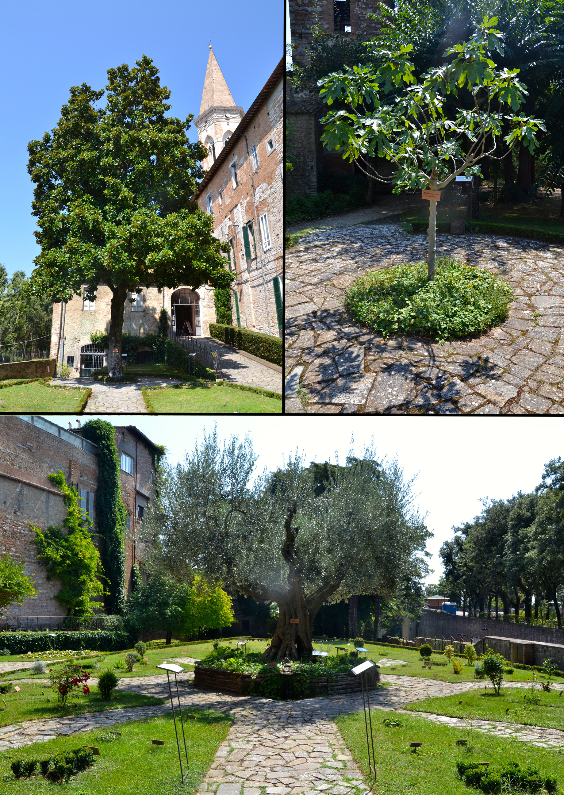 Giardino dell'Eden all'interno dell'orto medievale di Perugia